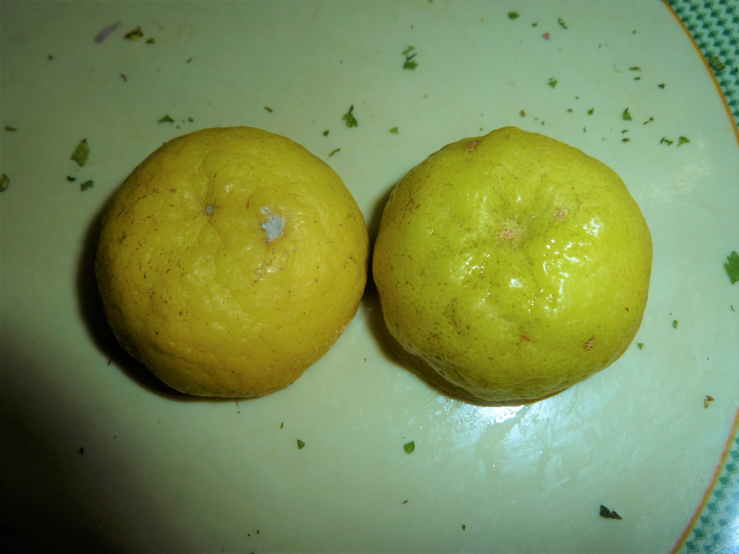 నిమ్మకాయలు